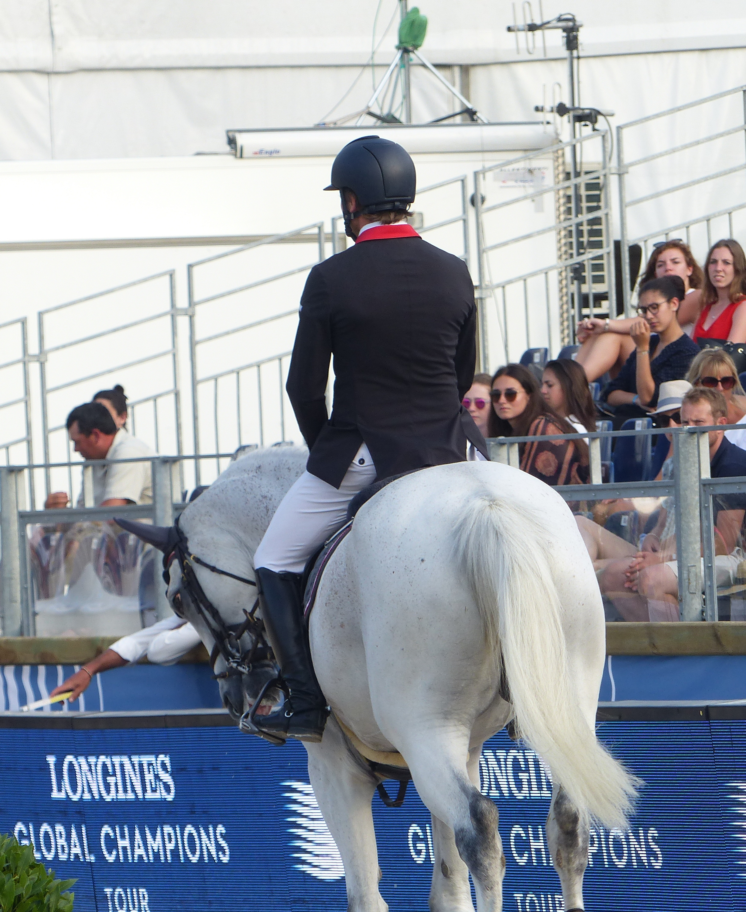 Le cavalier autrichien Christian Rhomberg montant Saphyr des Lacs au Paris Eiffel Jumping 2018.